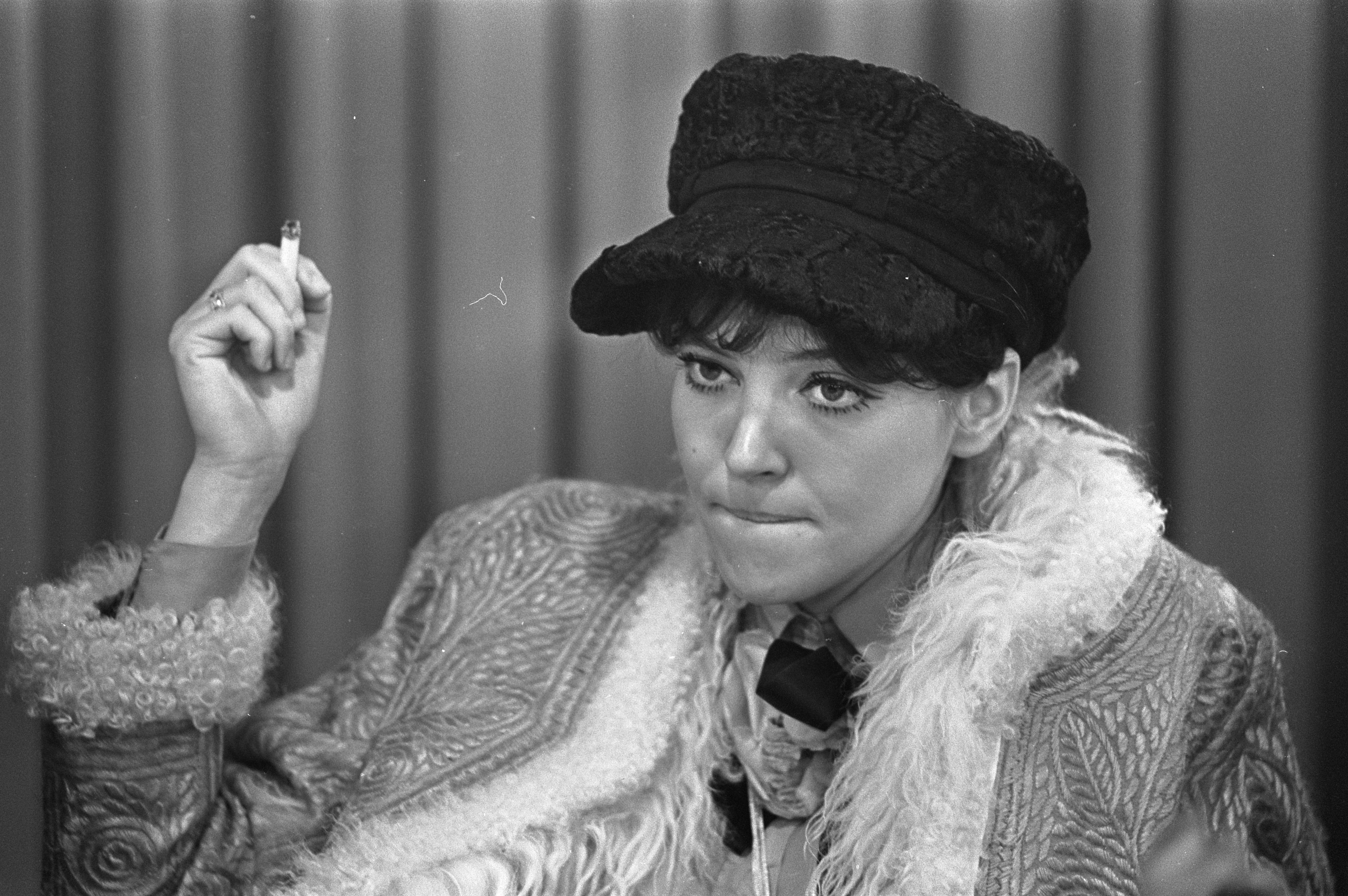 Anna Karina le 8 février 1968 à l'aéroport de Schiphol à Amsterdam